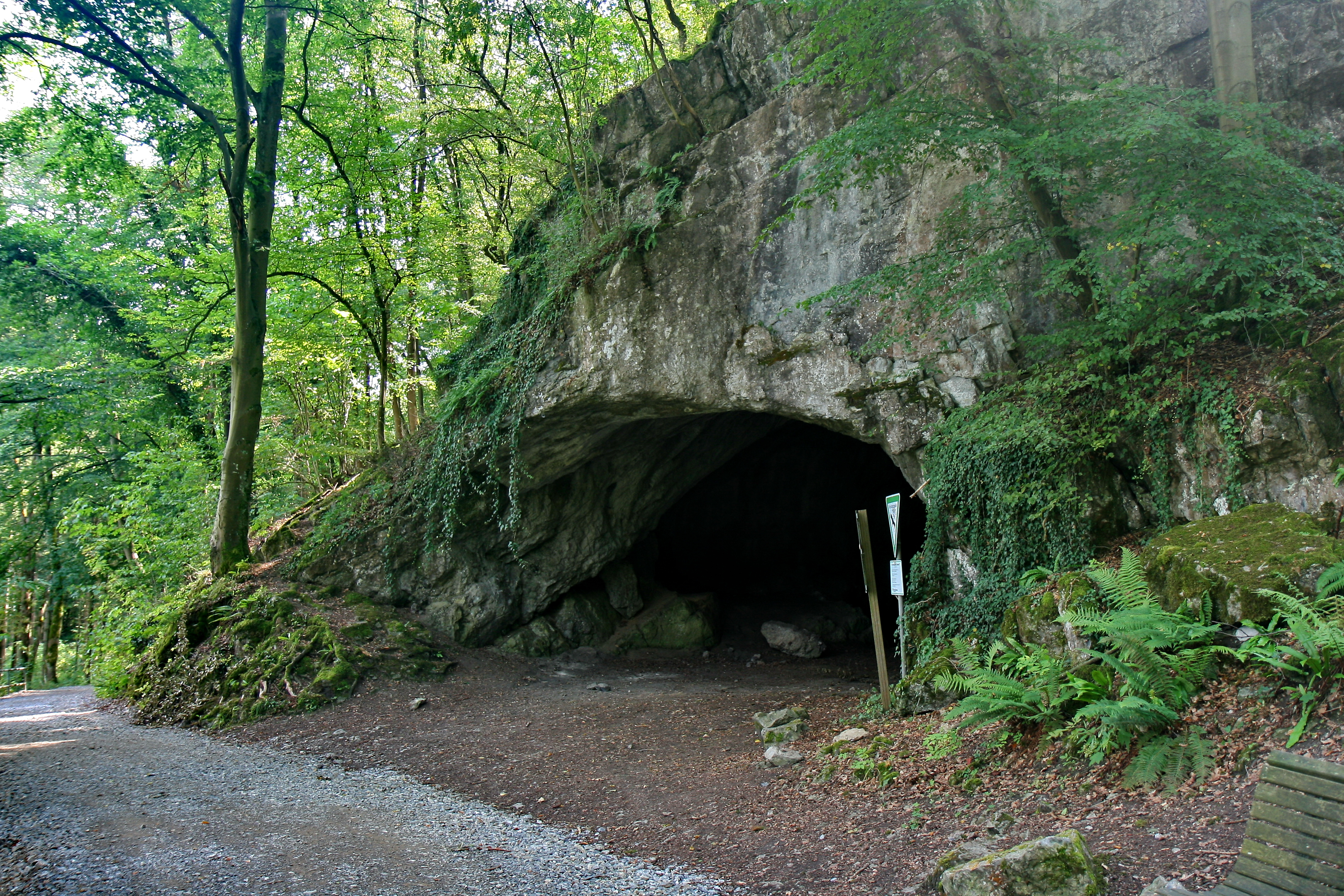 Feldhofhöhle im Hönnetal, Balve-Volkringhausen.